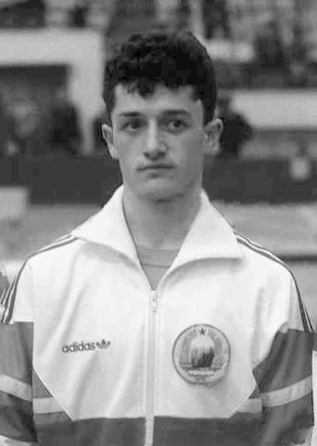 Marius Toba la Campionatele Internationale de Gimnastica, gazduite de Sala Sporturilor din Constanta.